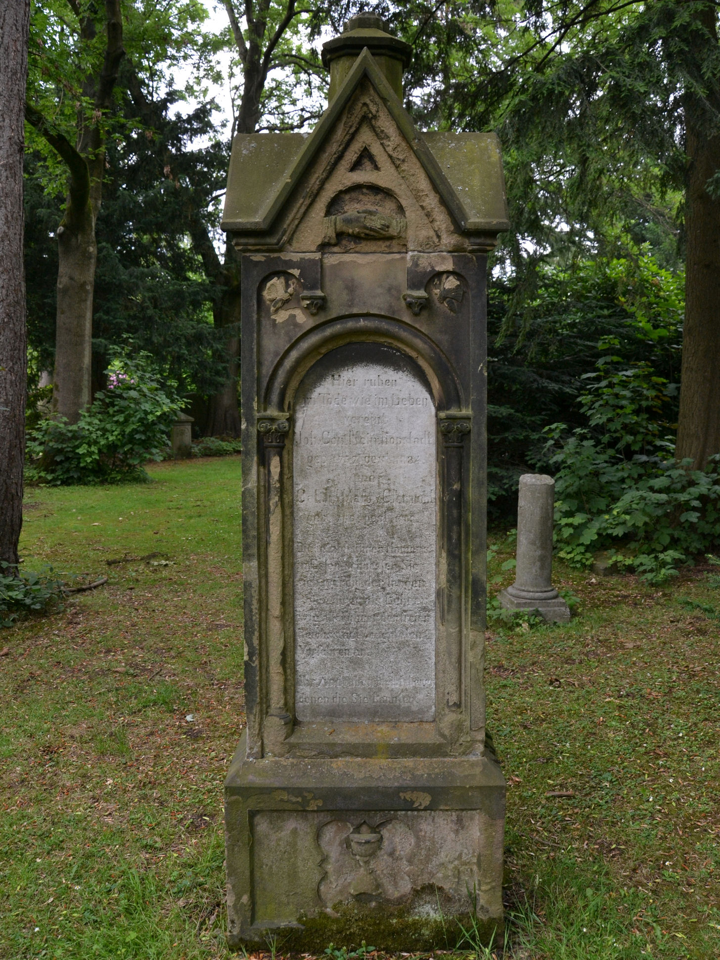 Johann Conrad Heinrich Kopstadt war ein deutscher Politiker und Bürgermeister von Essen. - Grabmal auf dem Ostfriedhof Essen.